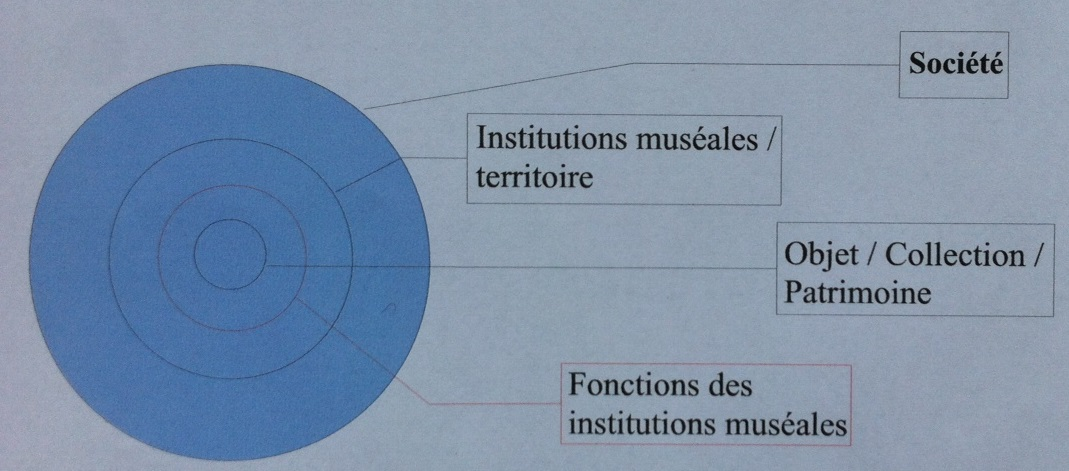 Ce schéma, constitué de sphères imbriquées imitant le système solaire, matérialise l'interrelation des quatre niveaux de compréhension muséologique développés par Peter van Mensch.